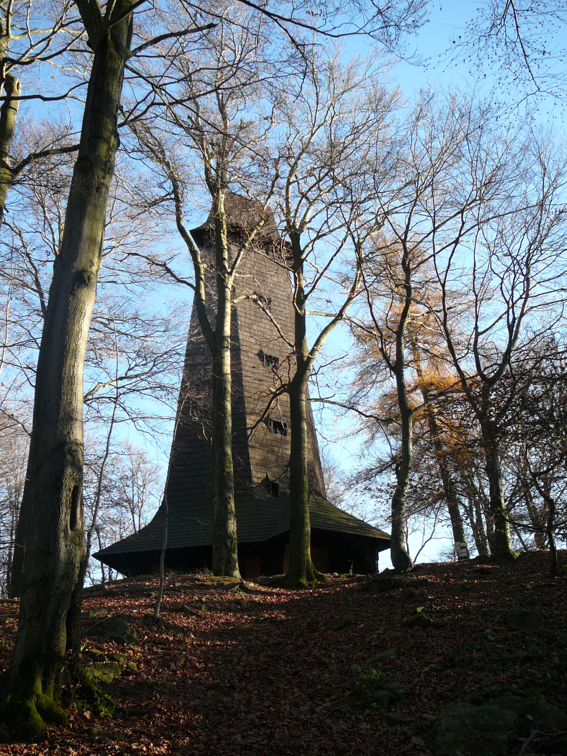 Rozhledna na vrcholu kopce Velký Blaník (638 m n.m.)